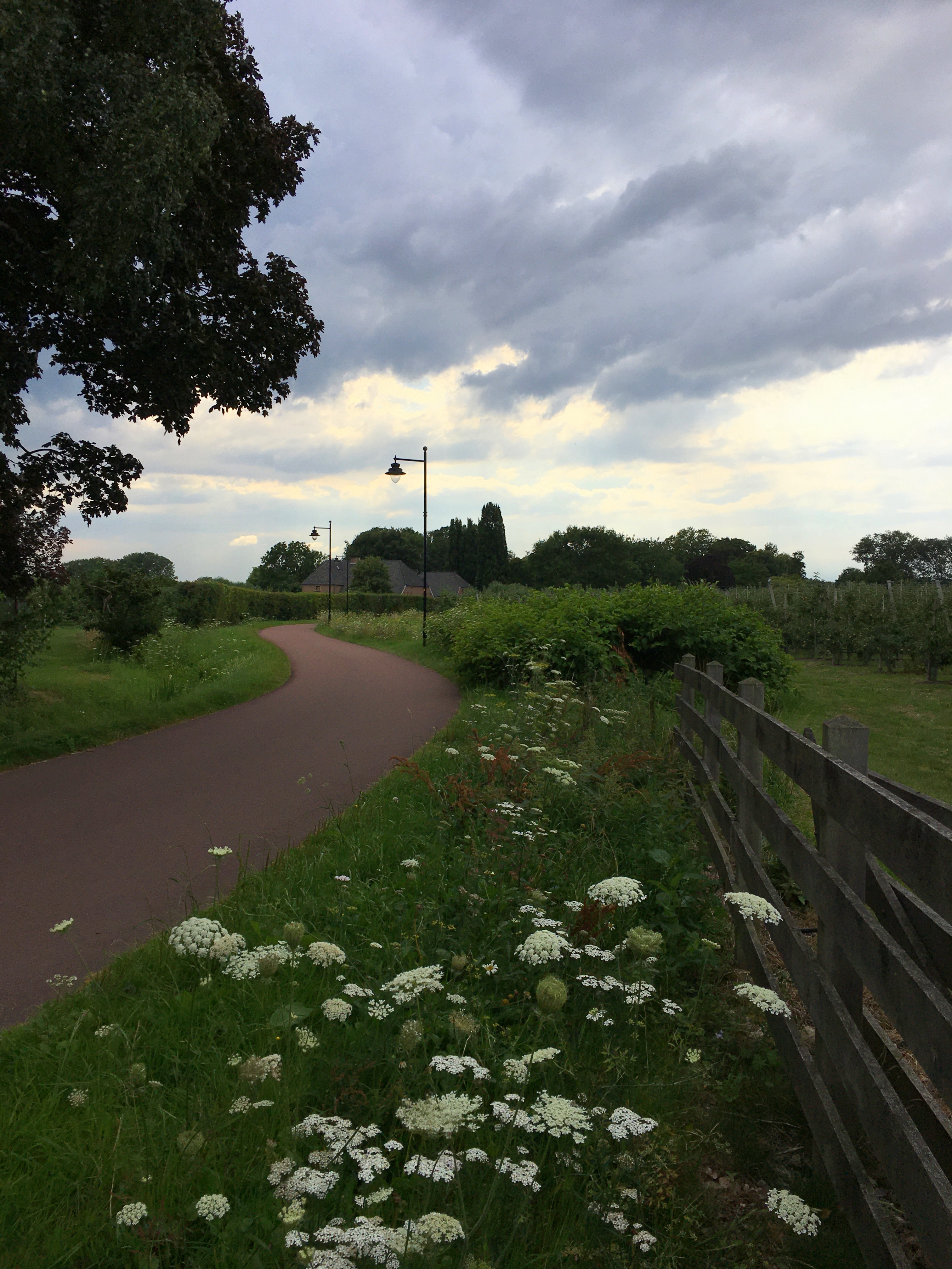 Zicht op de Slenkweg te Ressen. Onderaan op de foto (in de berm) zijn bloeiende exemplaren van de wilde peen (Daucus carota) te zien.